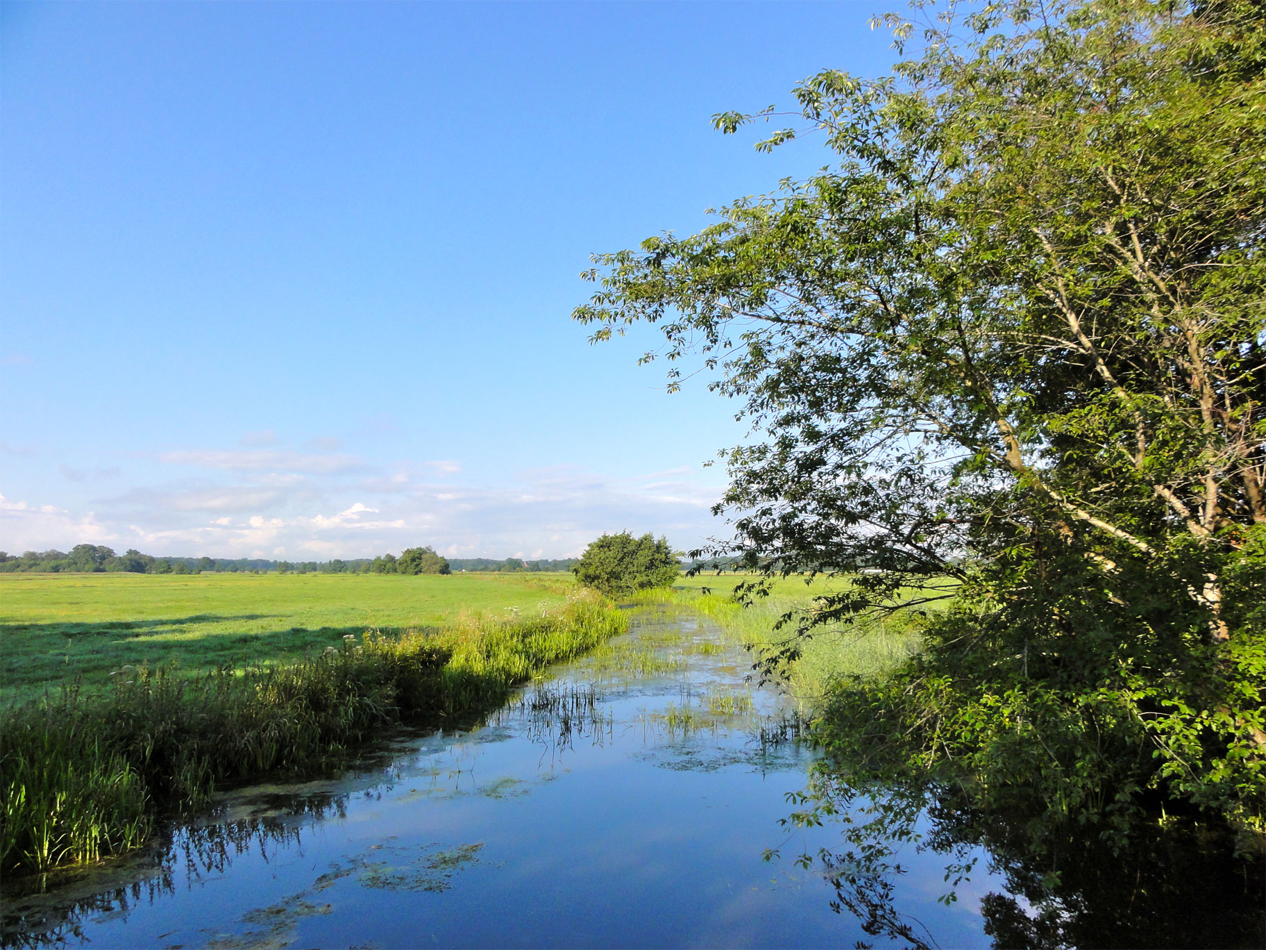 Koningsdiep (Boorne) bij de Lippenhuisterbrug